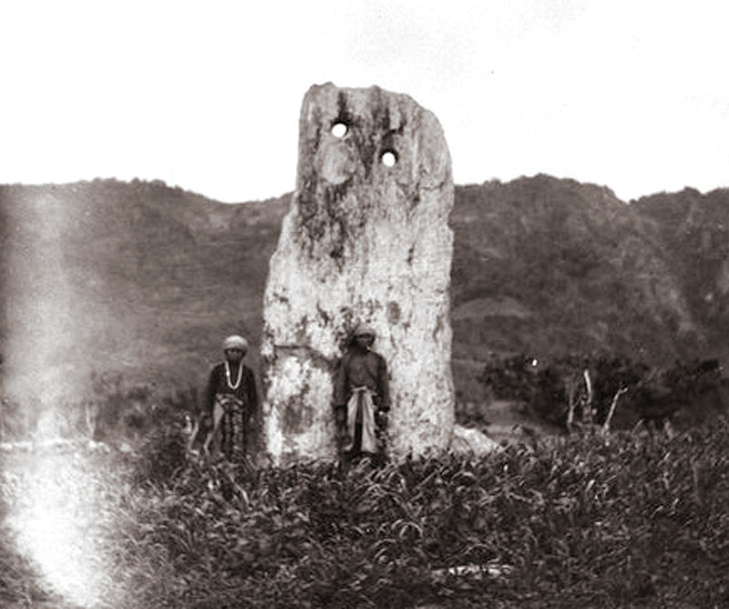 Memperbaiki gambar "Beinan Archaeological Site.jpg" dengan Photoshop. This file is a shared upload and may be used by other projects. Description: The Moon-shape Monolith/ by Japanese anthropologist Torii Ryūzō (鳥居龍藏)/ ca. 1896 大約在一百多年前，日本的學者鳥居龍藏來到台東卑南遺址，留下了最早的照片和記錄。月形石柱的價值，在於它所代表的象徵和意義，因為它正是卑南文化千年故事的起點。 Source: University of Tokyo's Torii Ryuuzou archive [1] (no date given)